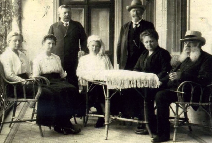 Knothe Family, from right side: Edmund Fryderyk Knothe, his wife Berta Knothe ( maiden name: Paetzold)